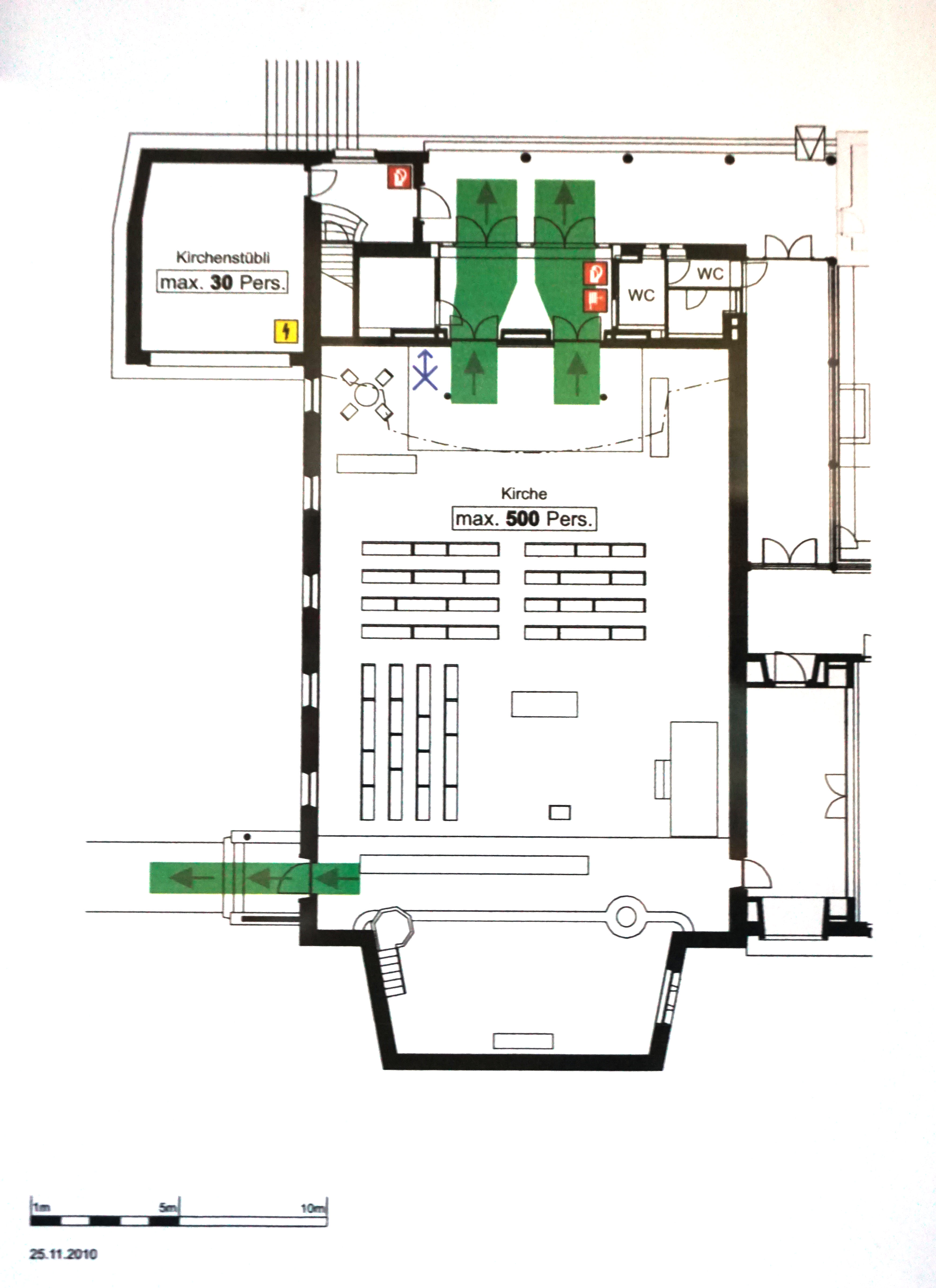 Kirche Wabern Grundriss